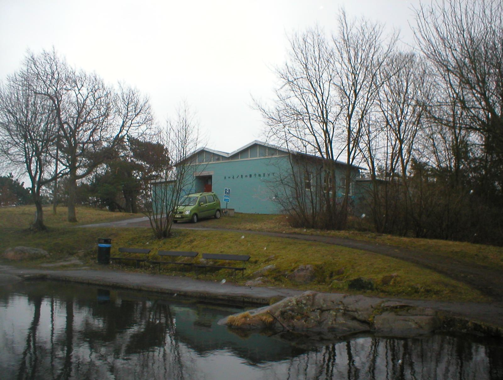 Foto av Observatoriet i Slottsskogen, taget av Per Johansson 2005.